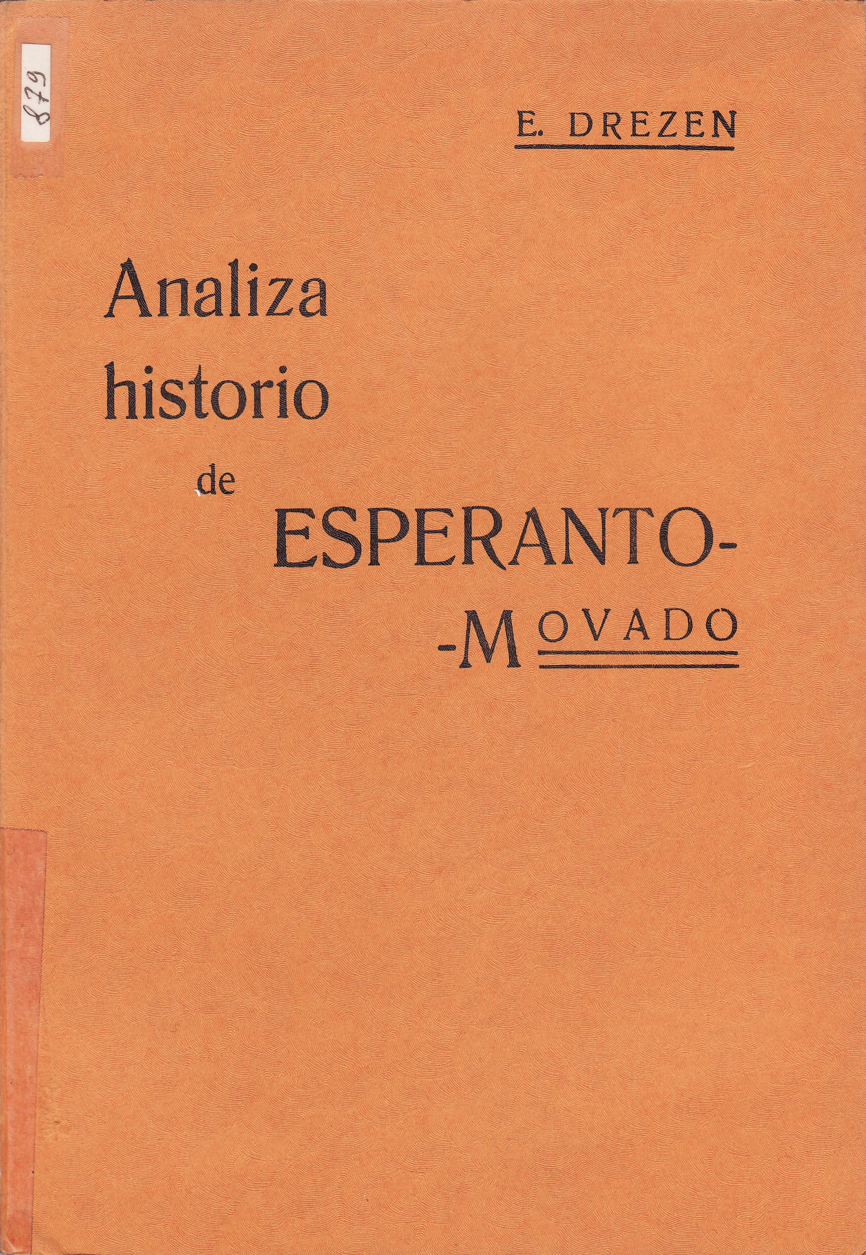 librokovrilo de libro " Analiza Historio de Esperanto-Movado", 1972